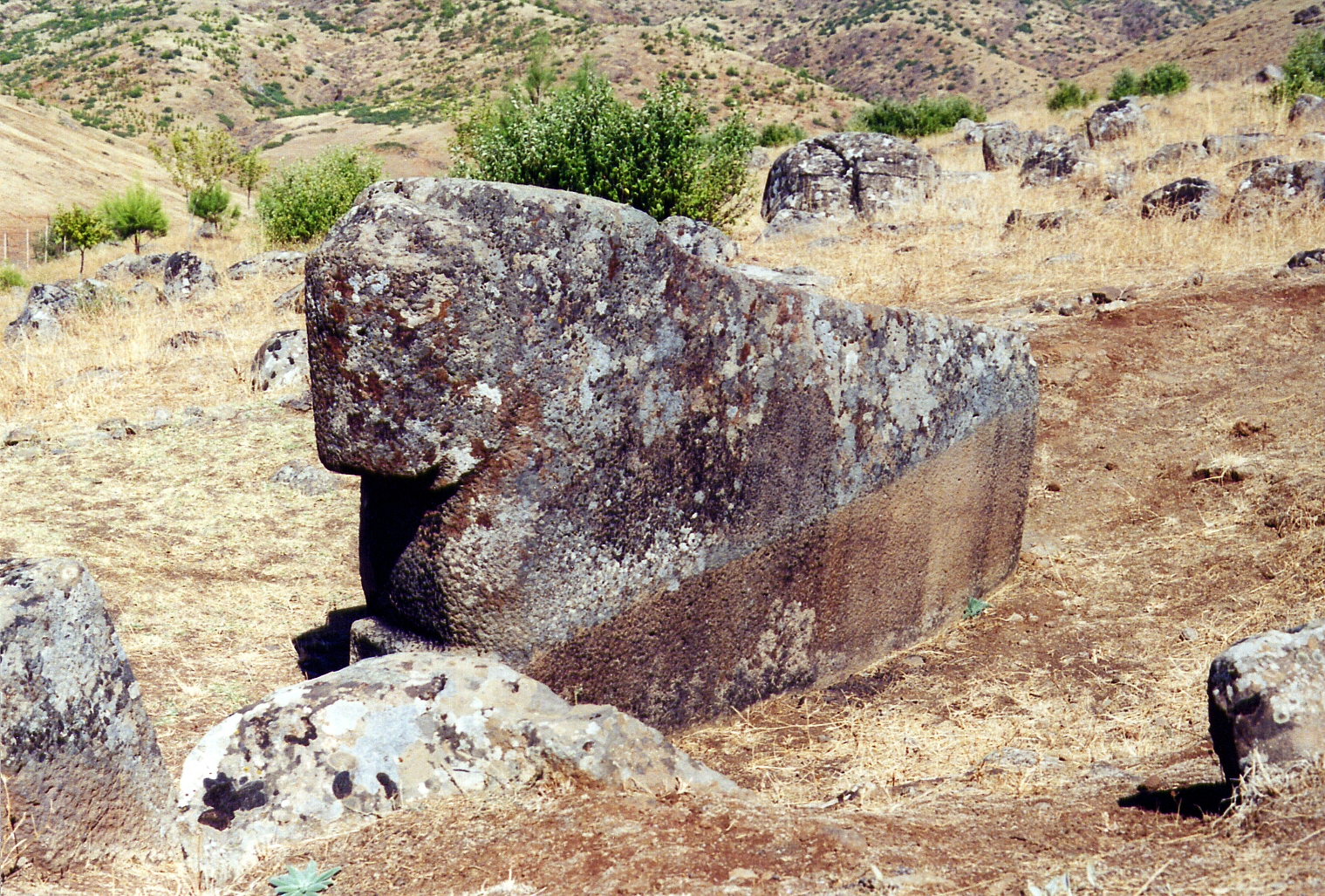 Yesemek, Hethitische Bildhauerwerkstatt, Südosttürkei, Torlöwe